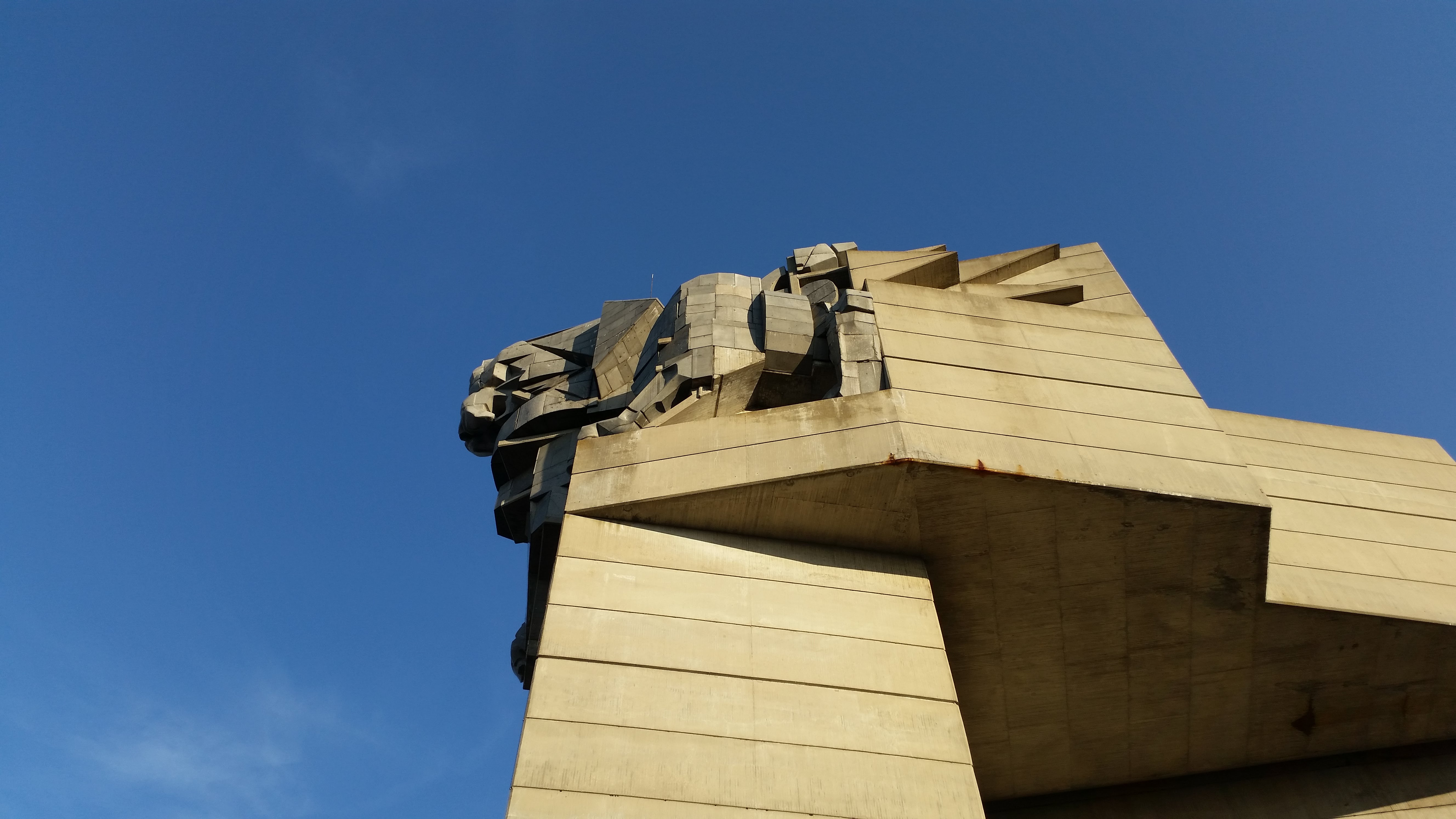 Detalle del León, símbolo de los búlgaros